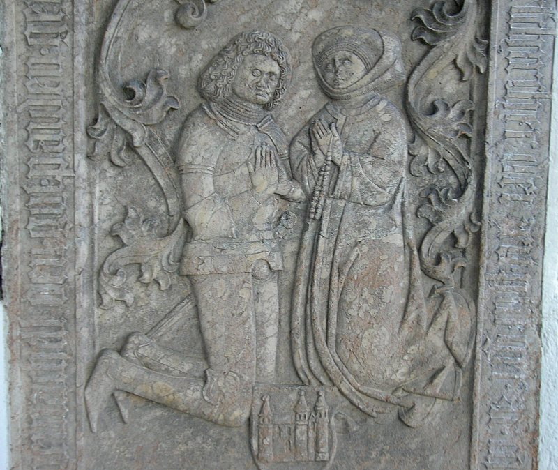 Pfarrkirche St. Michael (Mering, Landkreis Aichach-Friedberg, Bayerisch-Schwaben). Detail des Epitaphes des Erasmus Diepperskircher und seiner Frau (1482). Eigene Aufnahme, März 2007 / Parish church St. Michael (Mering near Augsburg, Bavaria, Germany). Epitaph for Erasmus Diepperskircher and his wife (1482). Detail. Own photo, March 2007